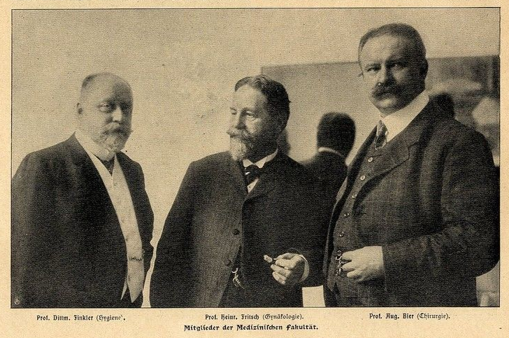 Die Professoren Dittmar Finkler, Heinrich Fritsch und August Bier von der Rheinischen Friedrich-Wilhelms-Universität Bonn, 1906